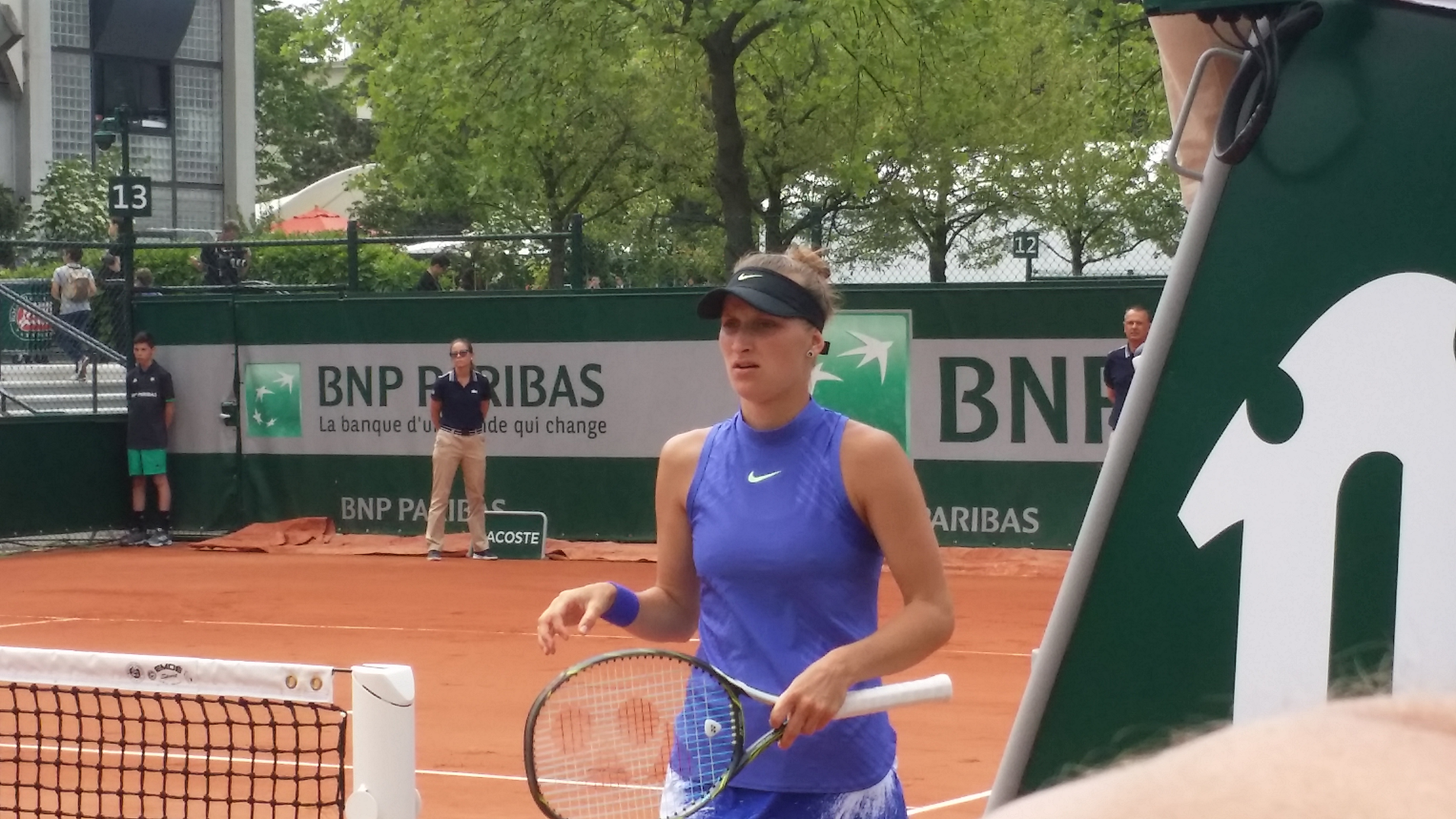 Markéta Vondroušová lors de son premier tour des qualifications face à Nadia Podoroska (court n°13)